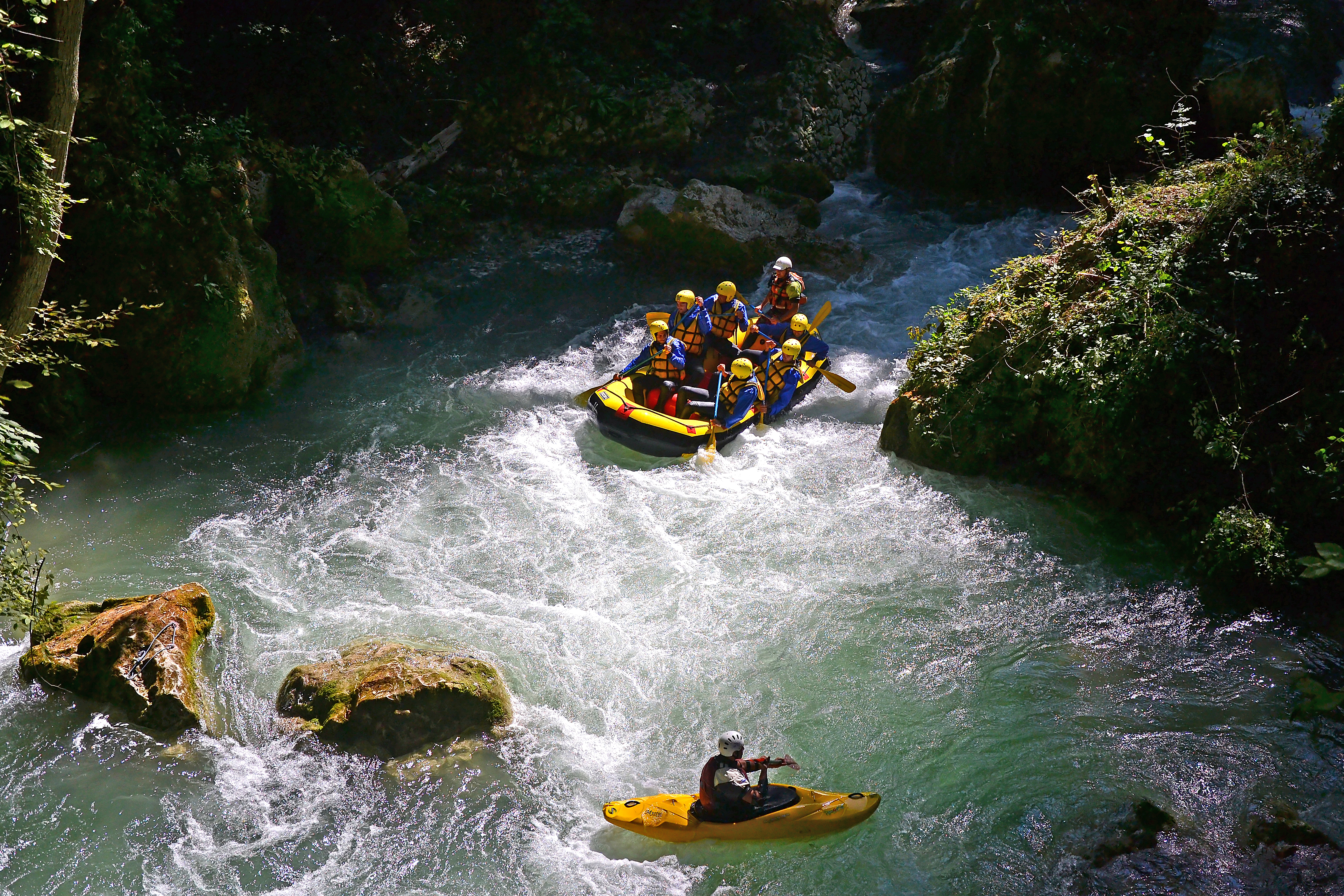 Sport estremi sul fiume Nera subito dopo l'ultimo salto della cascata. This is a photo of a monument which is part of cultural heritage of Italy.